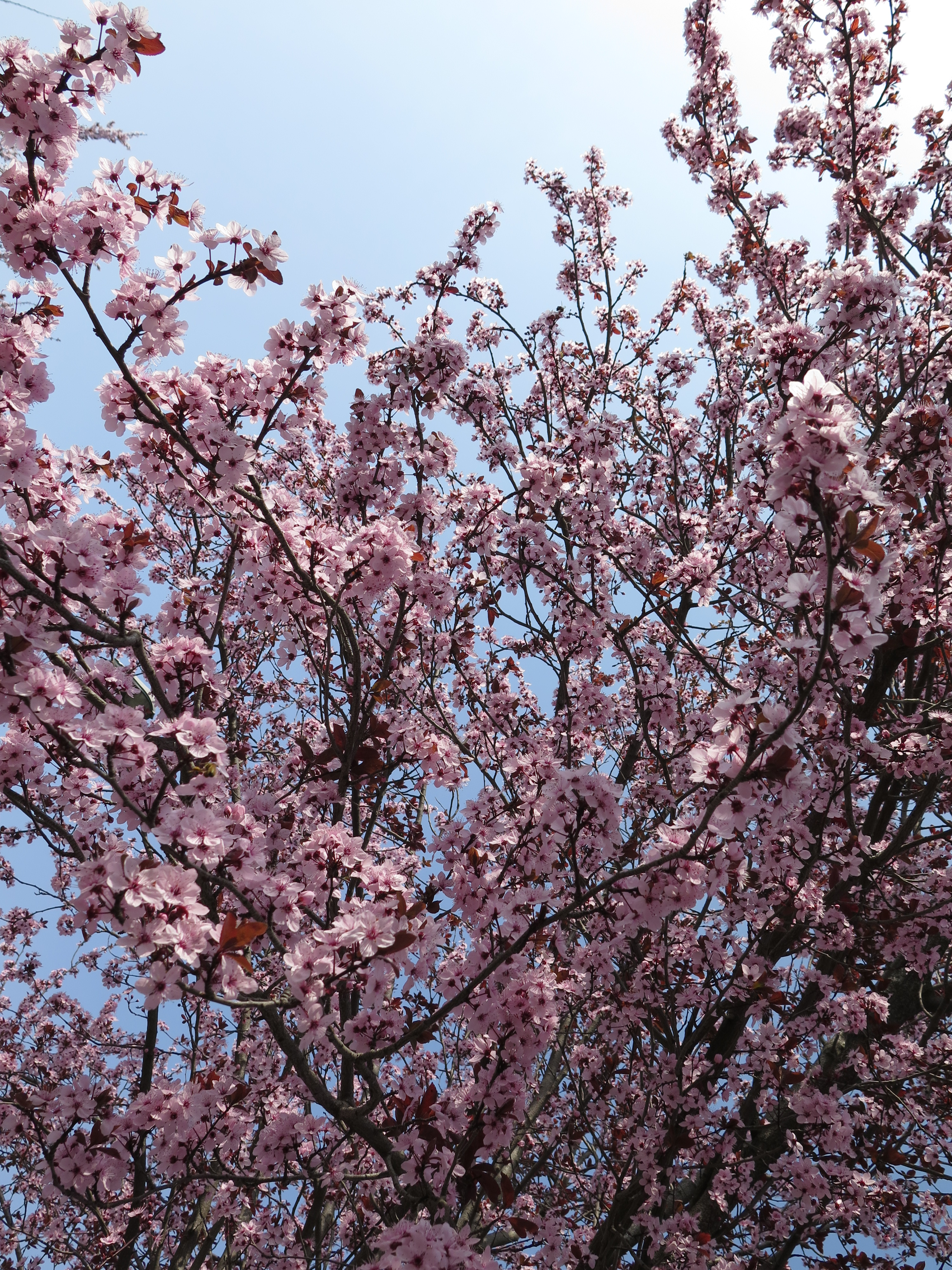 Pruno in fiore